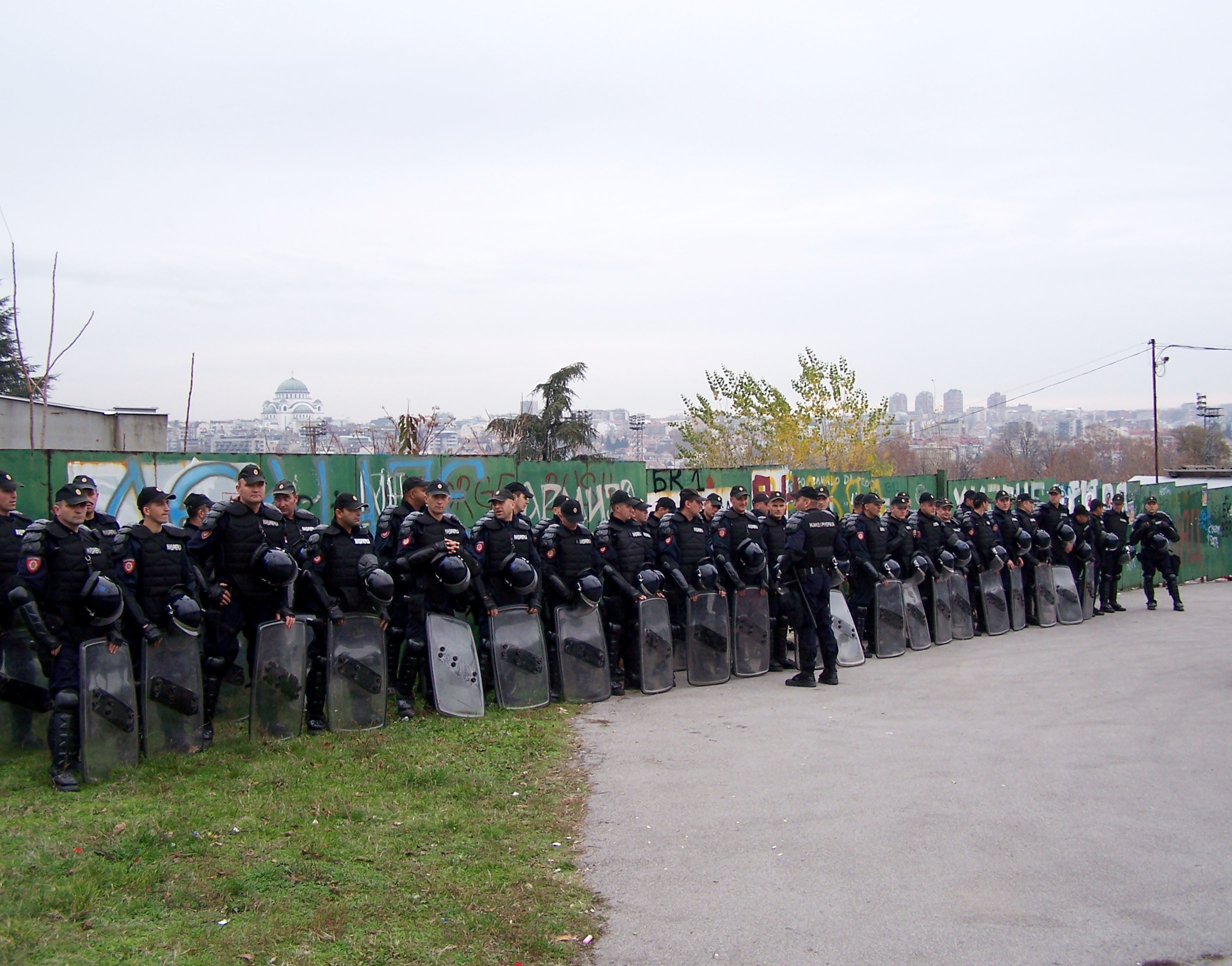 Serbian gendarmerie in front of Stadion Crvena Zvezda in Belgrade